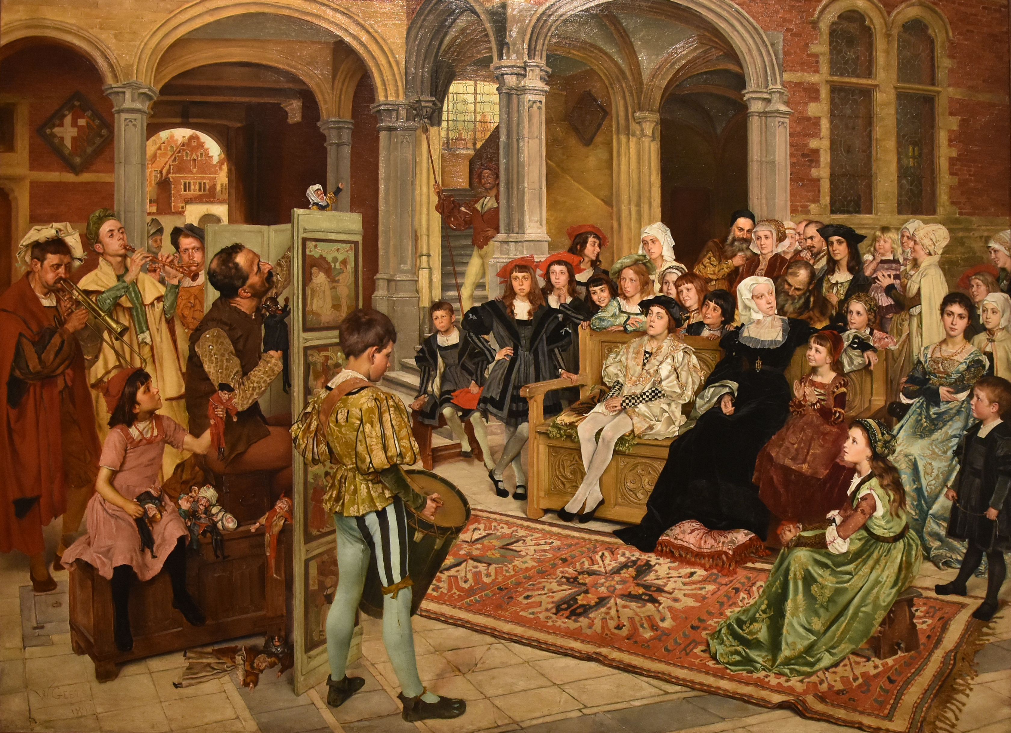 Willem Geets (1838-1919) Poppenspel aan het hof van Margaretha van Oostenrijk (1892) Museum Hof van Busleyden Mechelen This photo of movable heritage has been taken in the Flemish Region